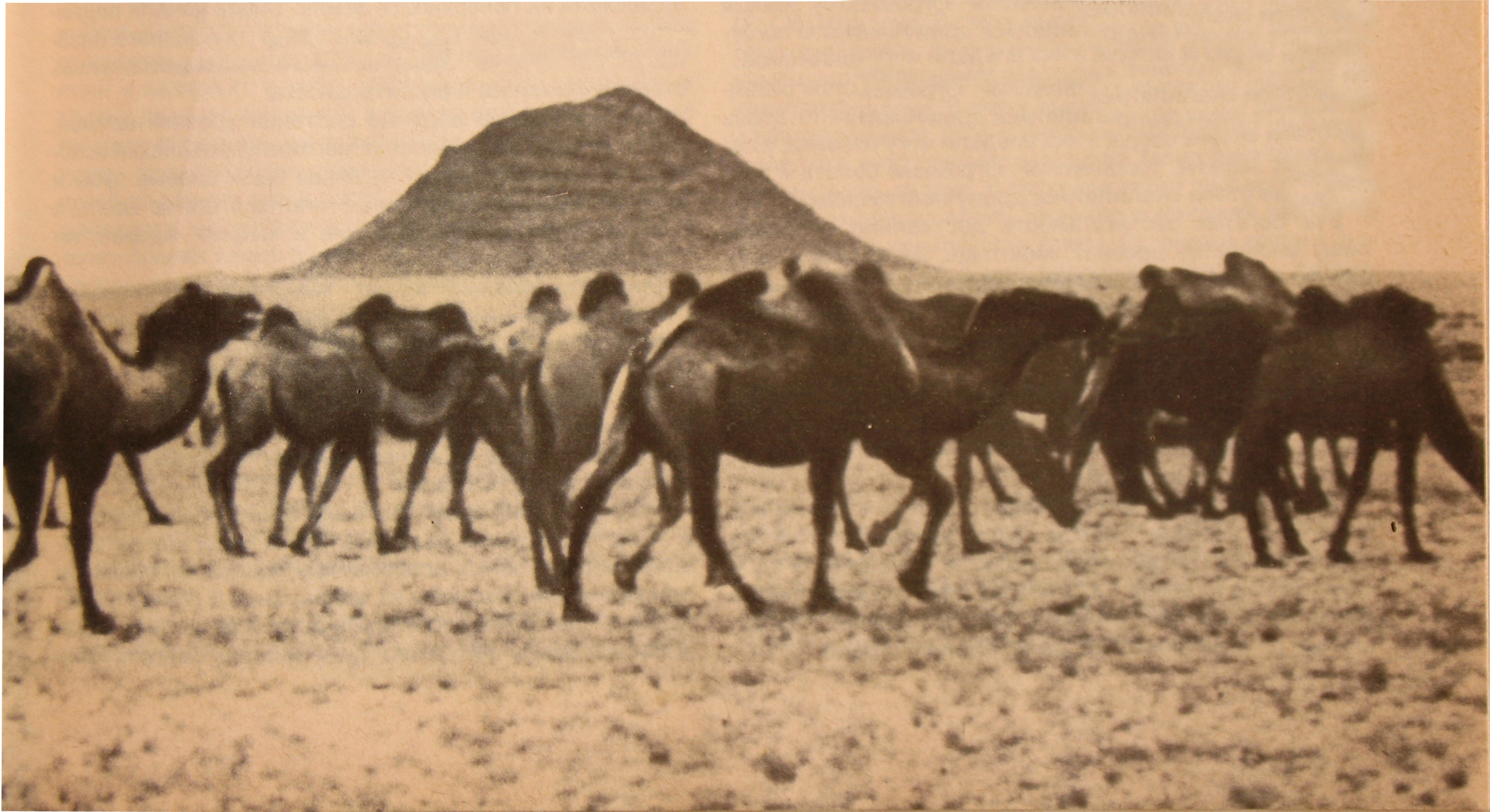 Photo in Mongolia, Noin-Ul. 1924 - 1925. Ноин-Ульский гуннский курган (один из нескольких). Раскопки археологов СССР в Ноин-Уле, сезон 1924 или 25 года, 100 км на север от Улан-Батора (Урги). Журнал "Вокруг света", СССР.